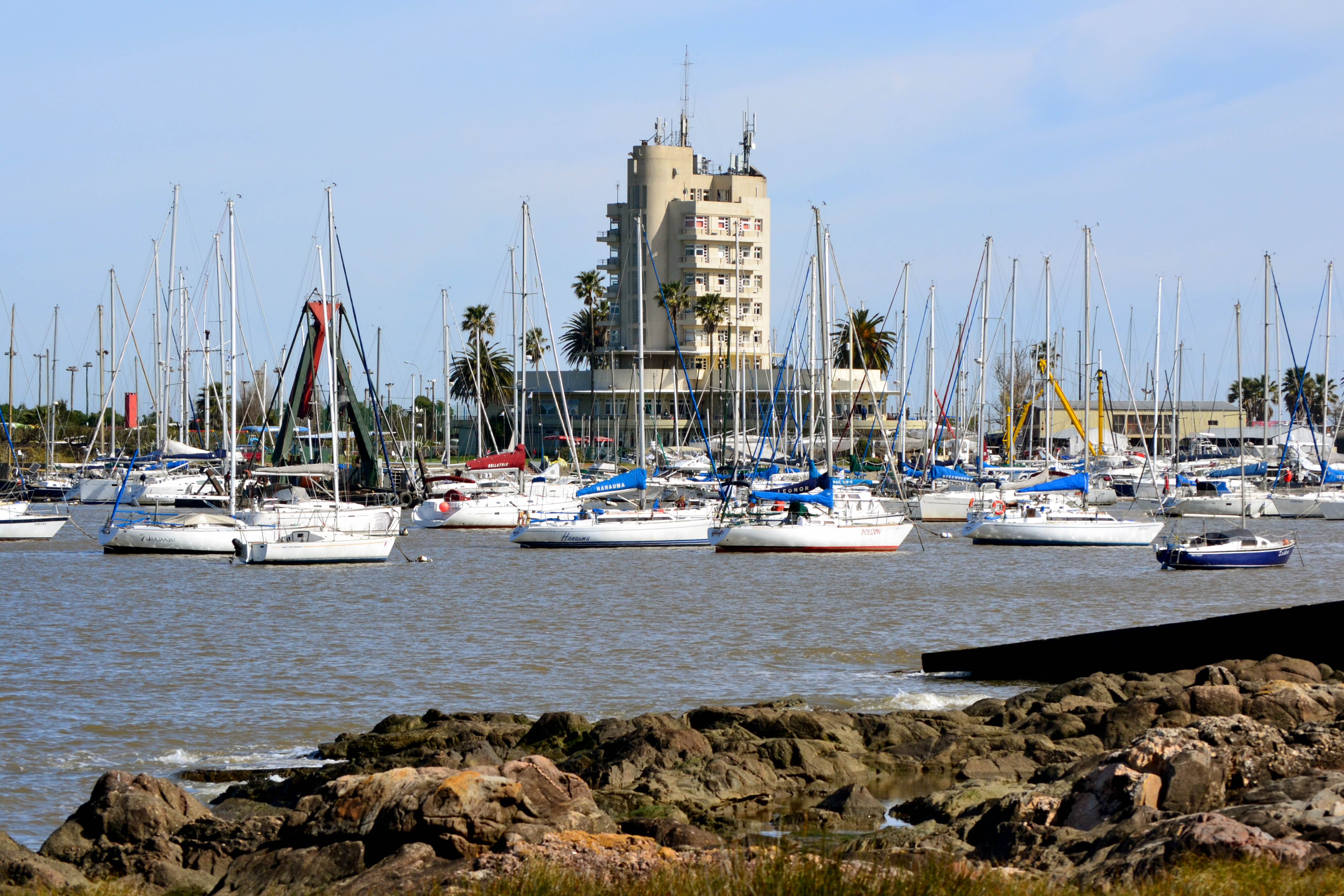 Yacht Club. Ubicada en el departamento de Montevideo